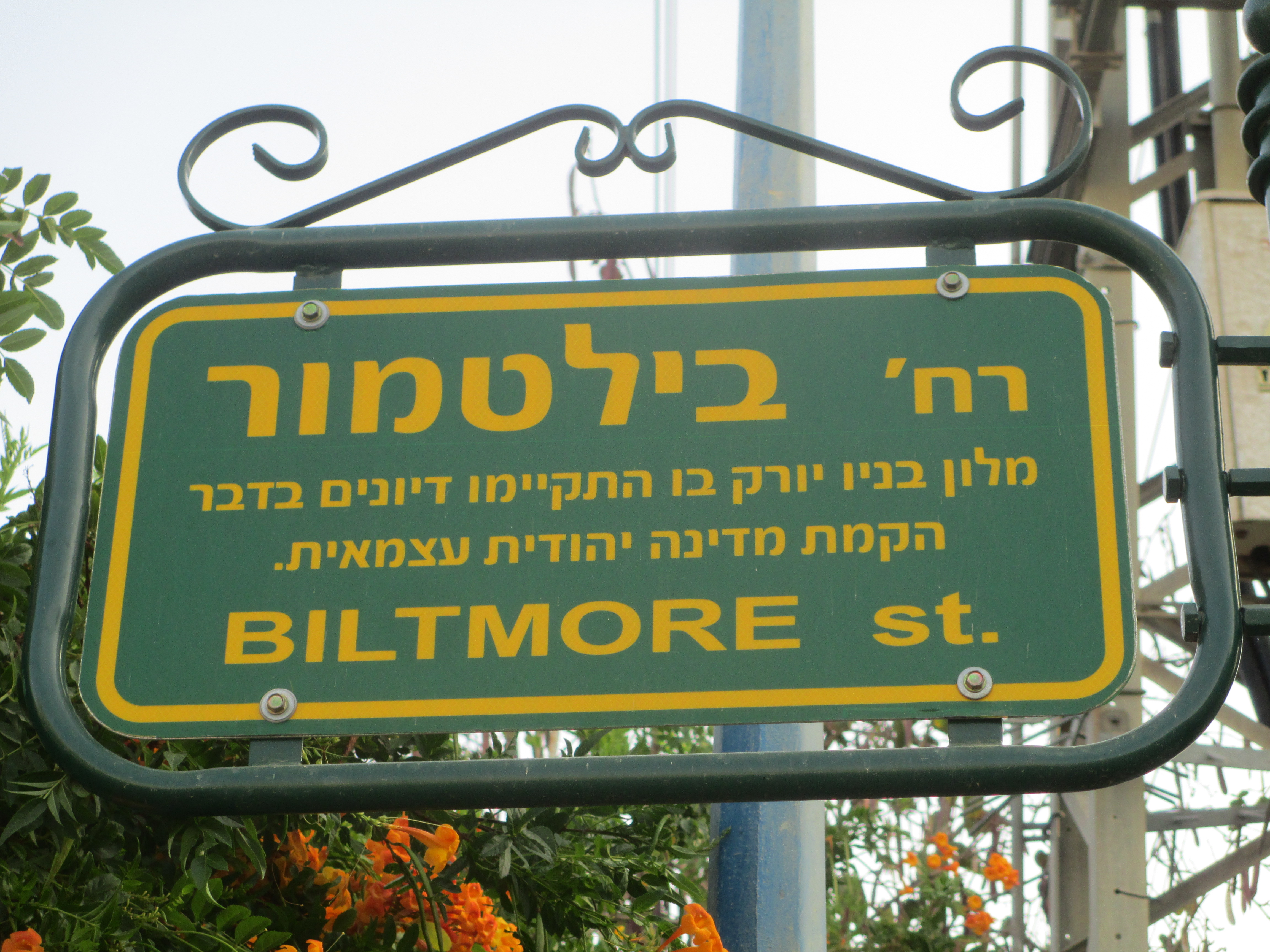 רחוב בילטמור בפתח תקווה